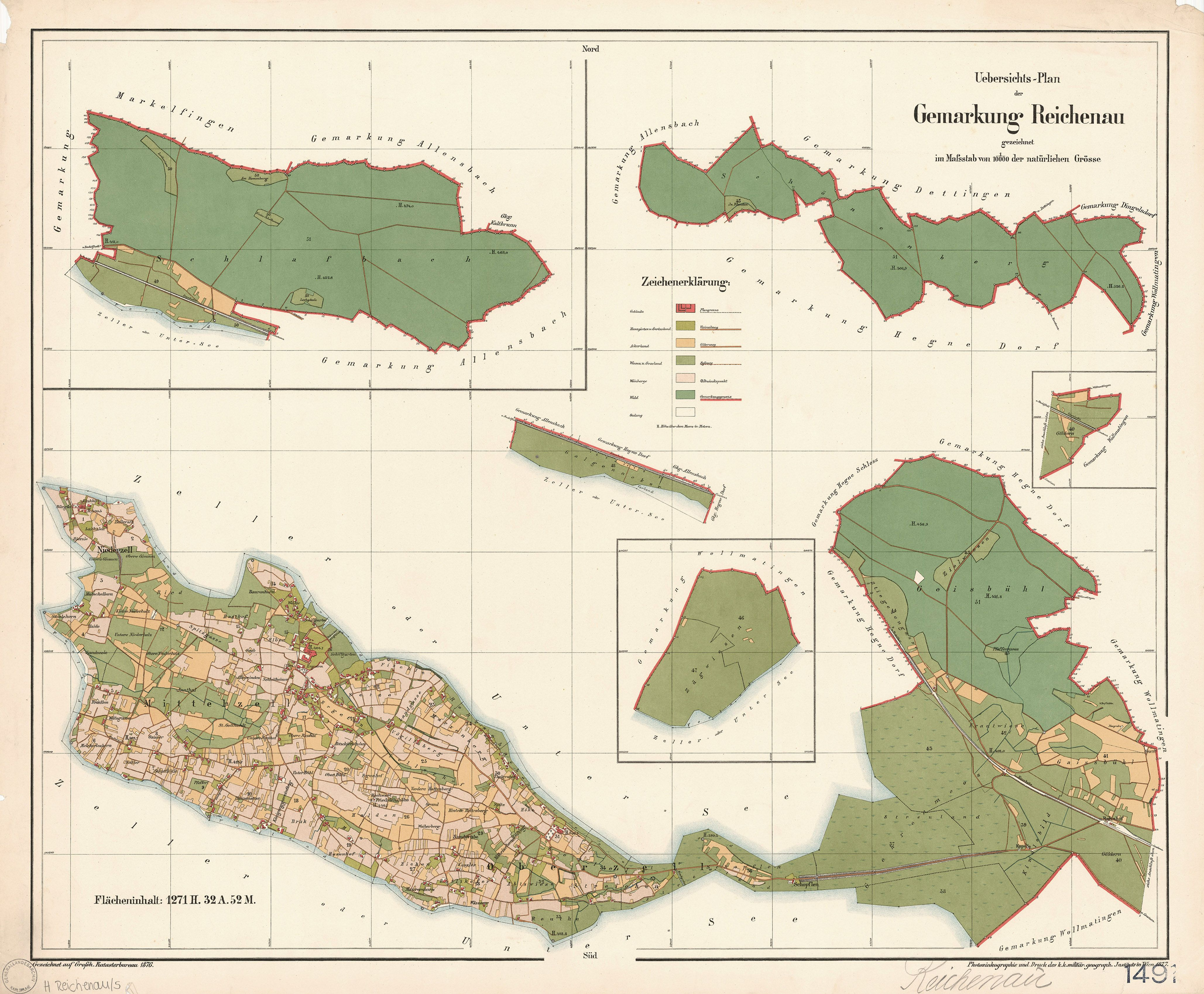 Gemeinde Reichenau: Katasterplan mit allen Gebietsteilen und Exklaven, mit Flurnamen